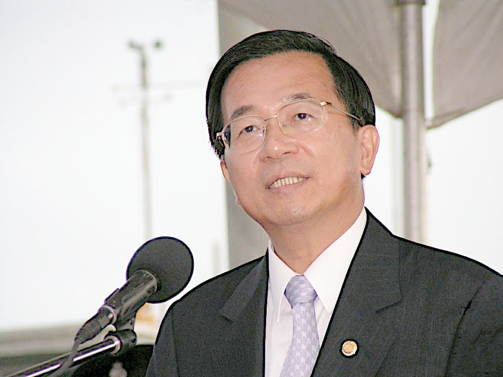 Chen Shui Bian